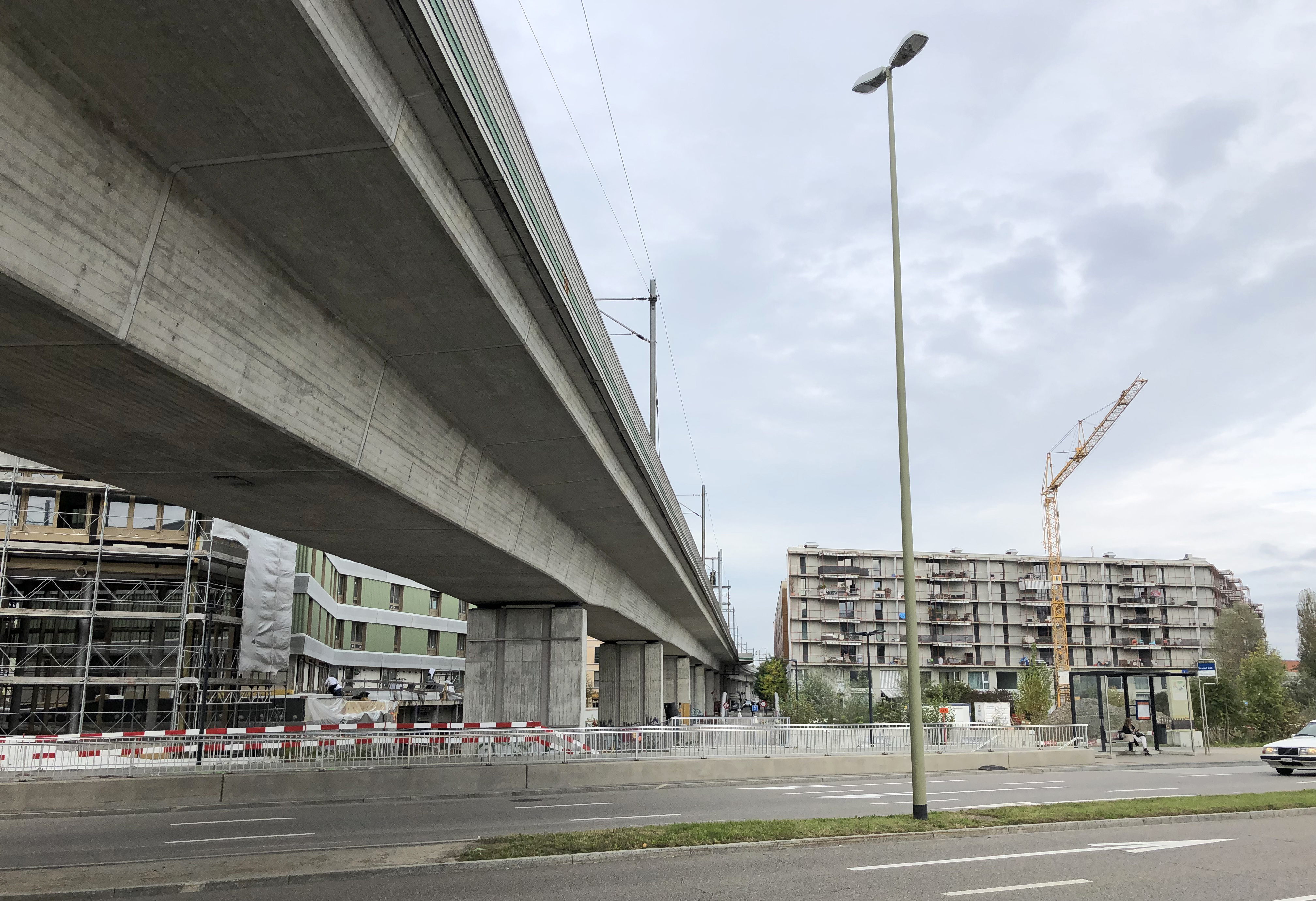 Dübendorf, Schweiz: Neugutviadukt, Überlandstrasse und Neubauten auf dem Zelgli-Areal